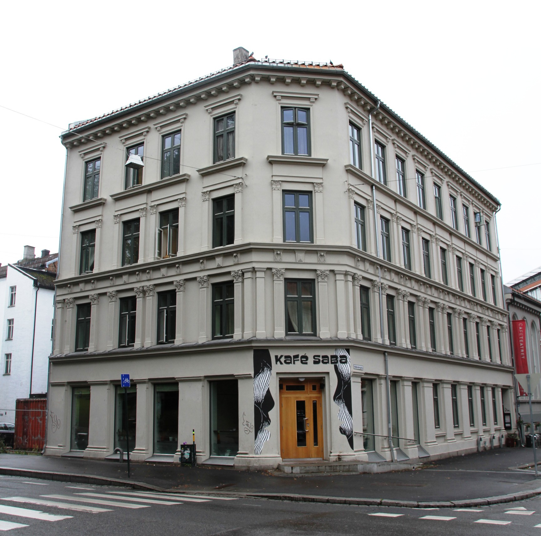 Bygård i Grønlandsleiret, Oslo.